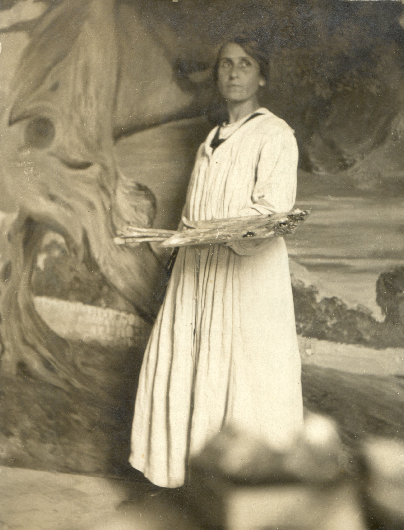 Pilar Montaner dando los últimos retoques al cuadro "el Dolor Humano", 1921.